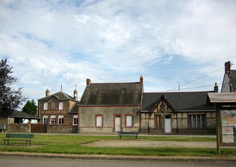 Les écoles de Notre Dame des Langueurs jusqu'à la fin du XXe siècle.